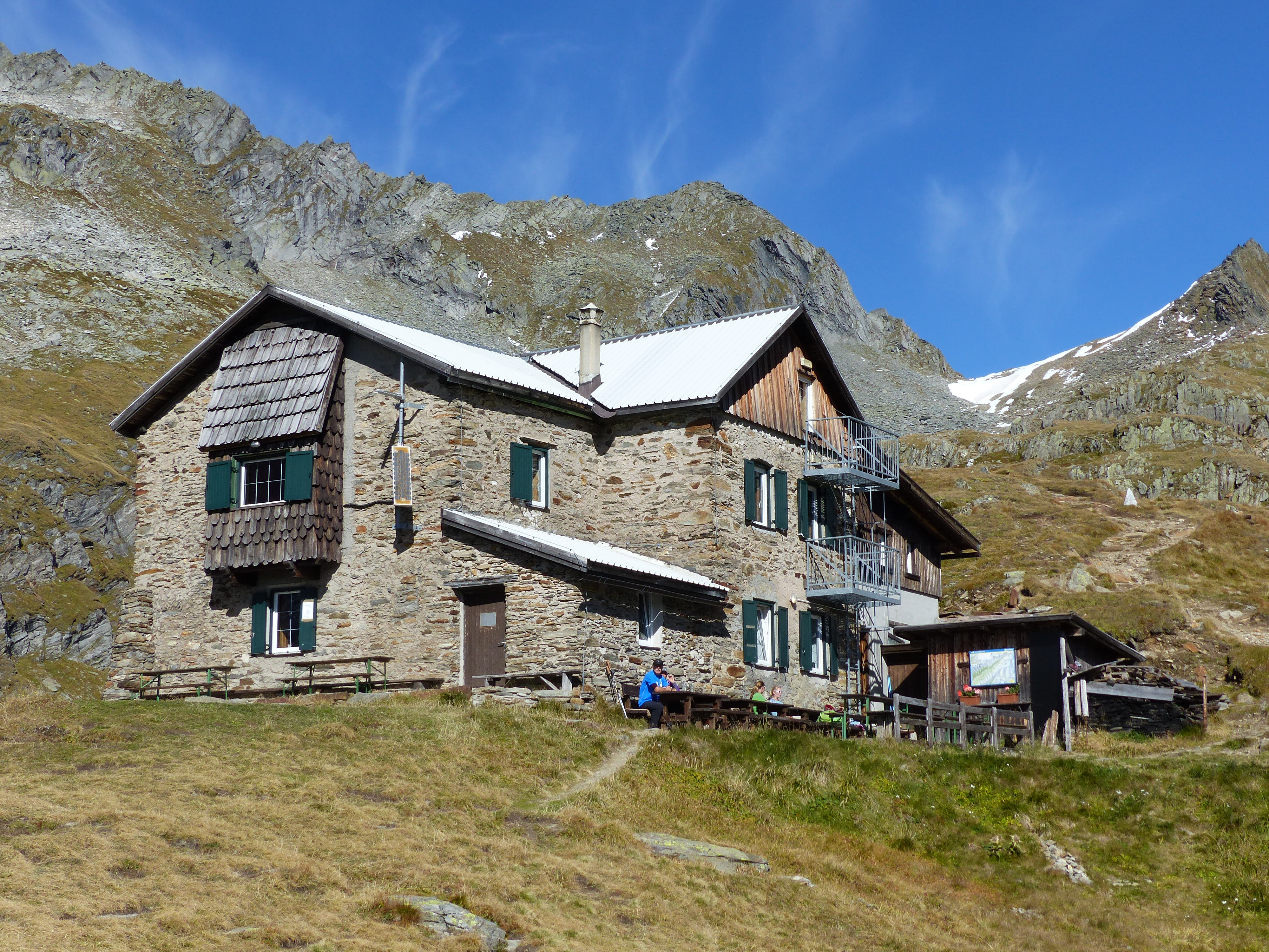 Birnlückenhütte mit Birnlücke (rechts)